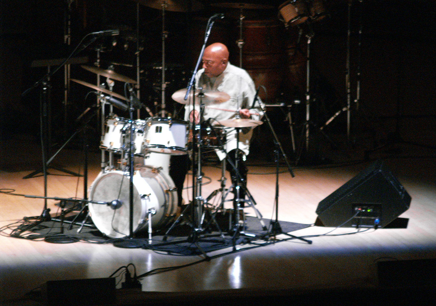 Jazz drummer Roy Haynes live at Carnegie Hall, September 18, 2007.